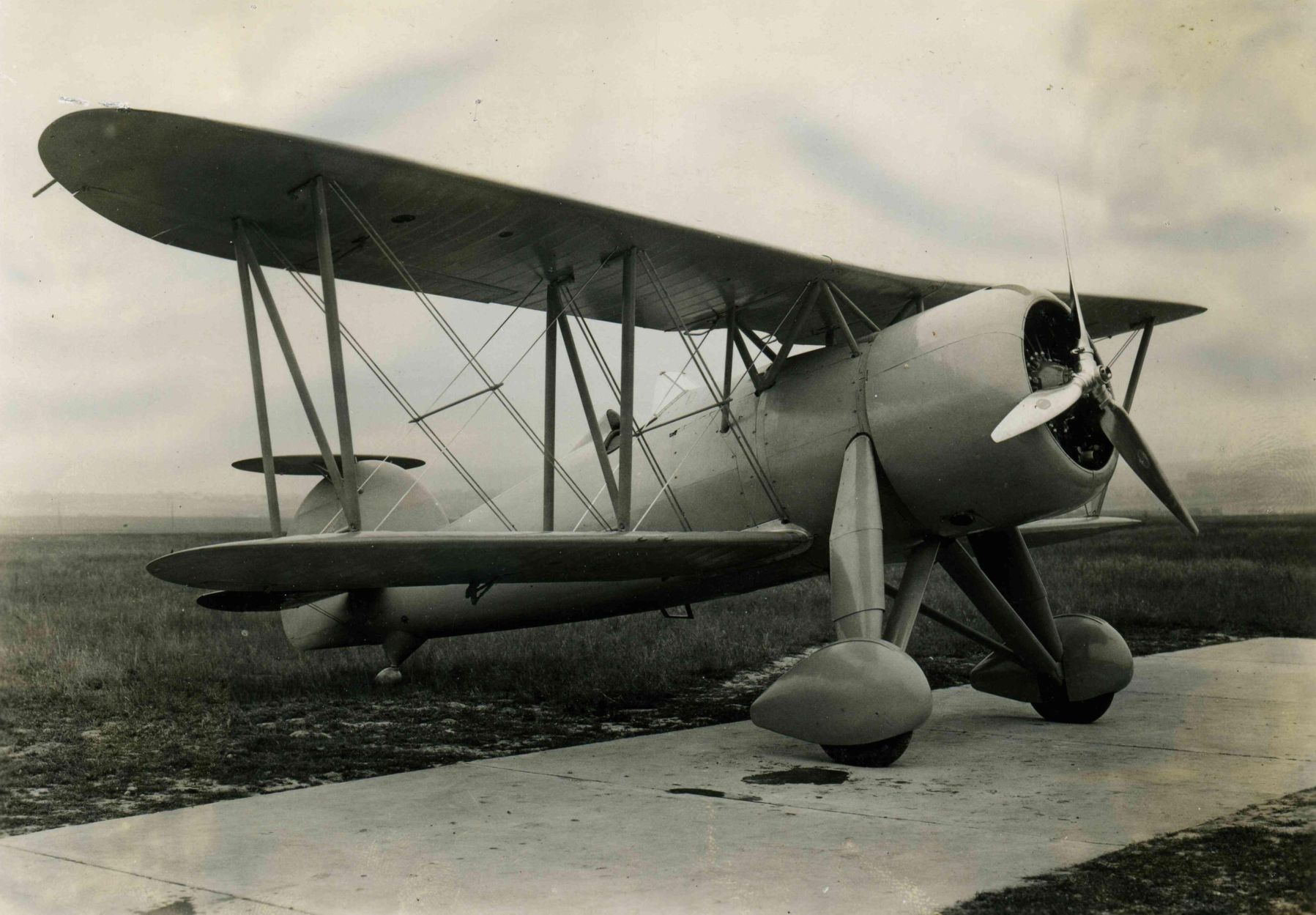 Foto der Fieseler Fi 98, ein einmotoriger Sturzkampfbomber als robuster Doppeldecker ausgeführt. Flügel in Metallaufbau mit Stoffbespannung. Rumpf- und Leitwerksaufbau aus Metall, die Ruder des Leitwerks stoffbespannt. Starres Fahrwerk. Einsitzig. Motor: BMW Bramo 322 H-2 mit 650 PS. Entwickelt und gebaut bei dem Fieseler Flugzeugbau Kassel.